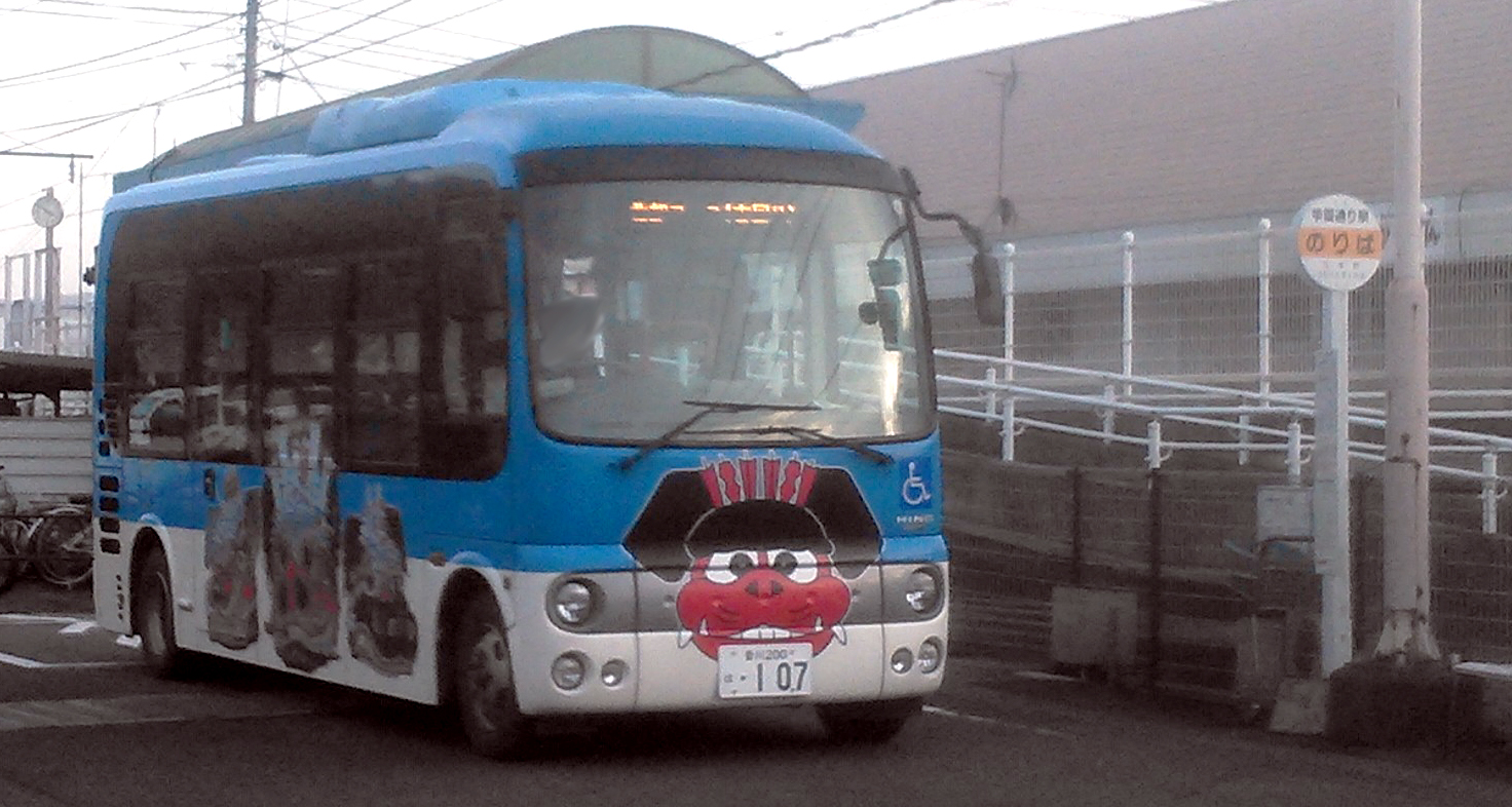 三木町コミュニティバス学園通りバス停留所、バス停車中。投稿者自身による撮影。